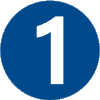 علامت خط مترو در شهر سئول، جمهوری کره